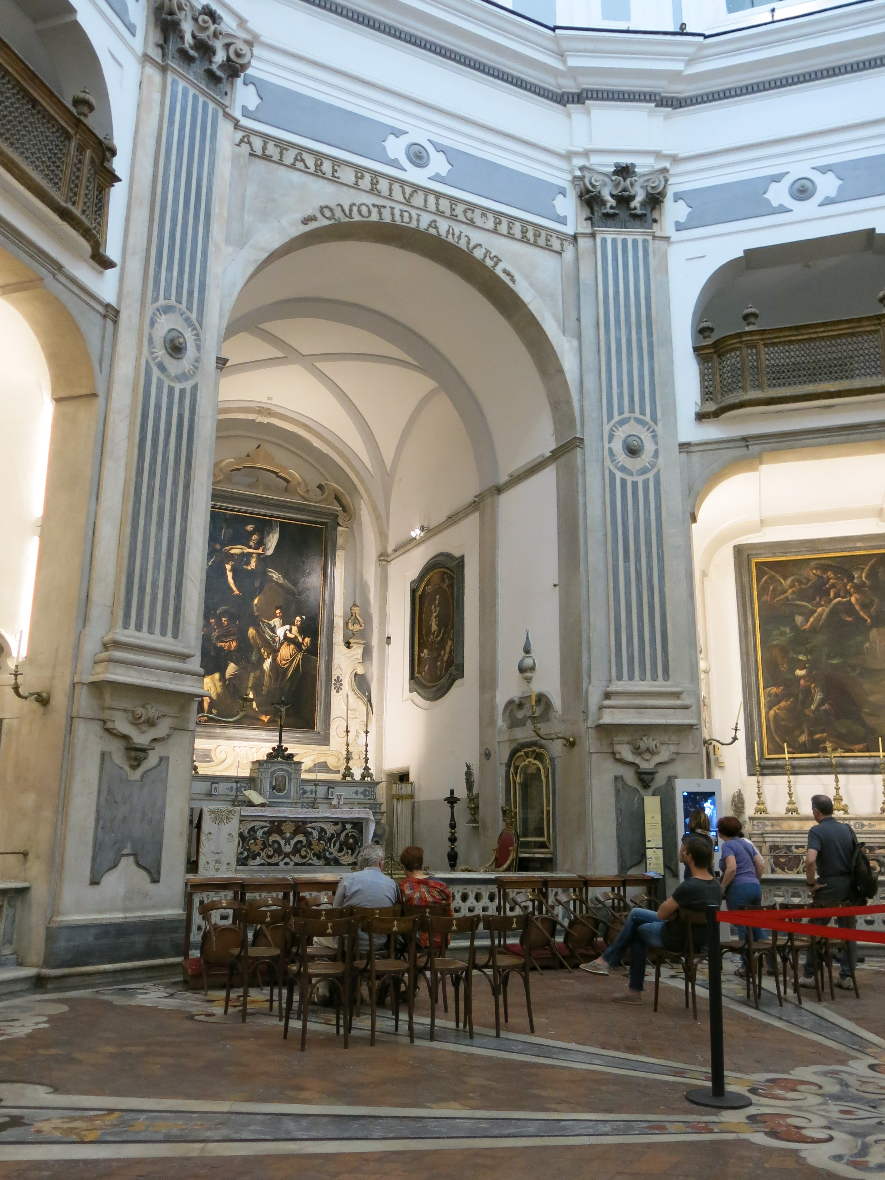 Le chiese di Napoli